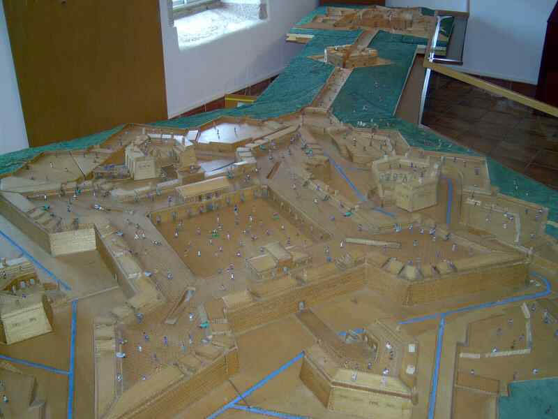 Maqueta del Fuerte en Aldea del Obispo.